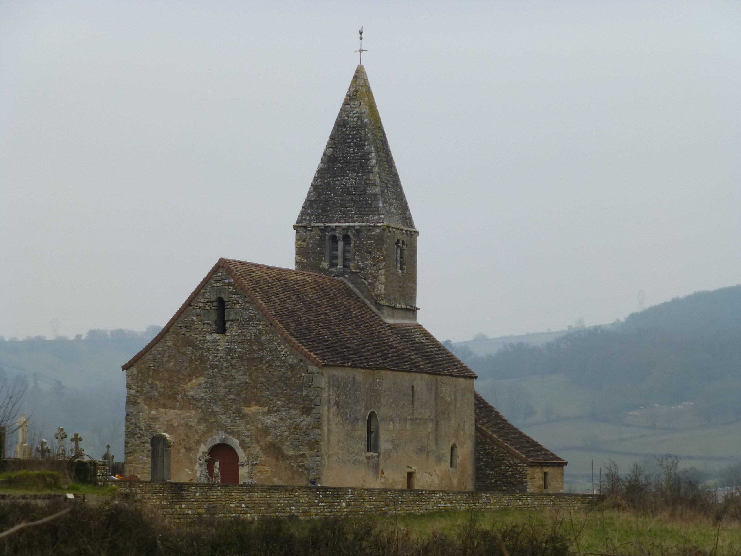 L'église de Cersot (Saône et Loire - France)